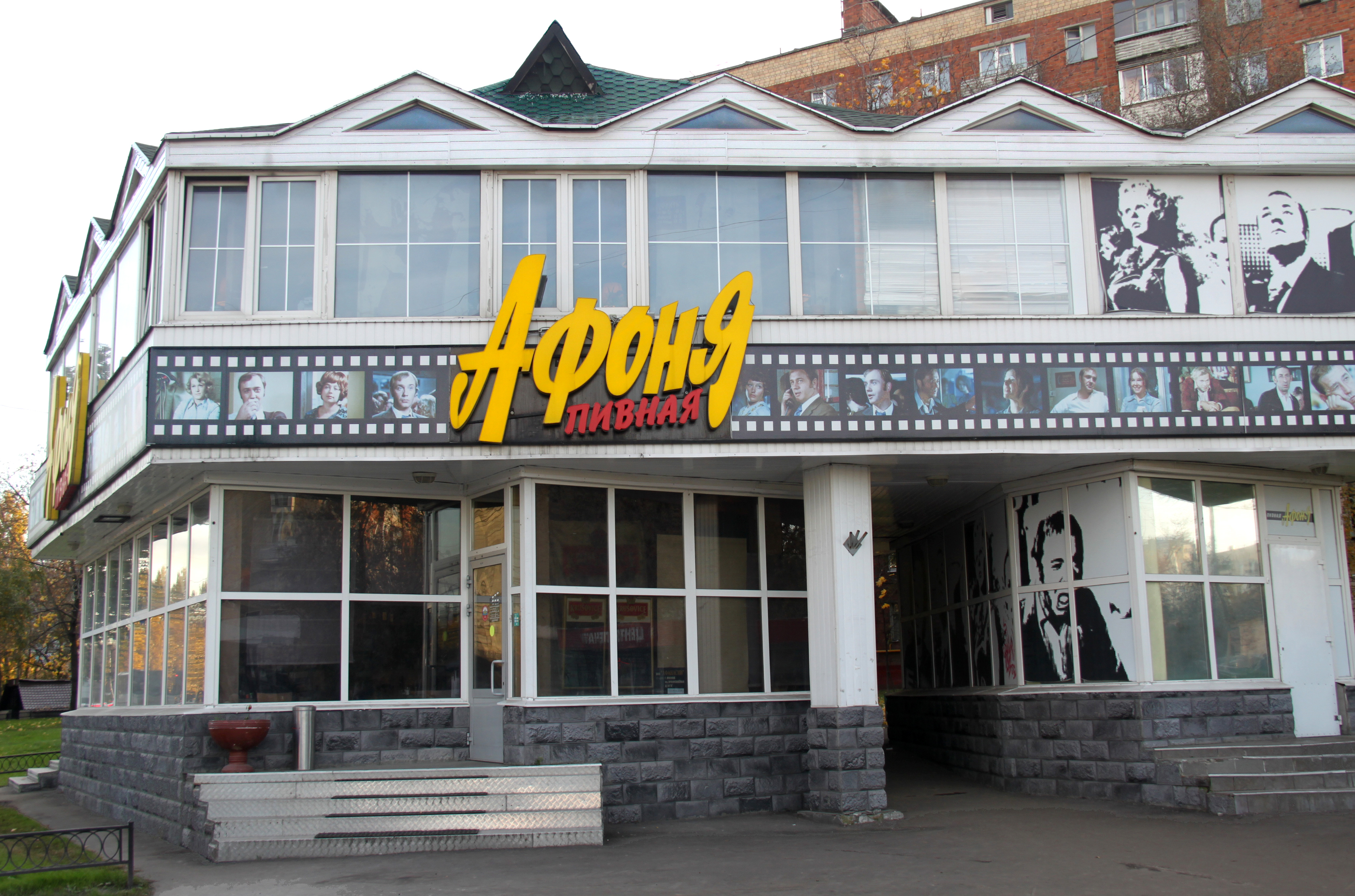 Пивная Афоня в Москве (Проспект Андропова, вл. 30А)